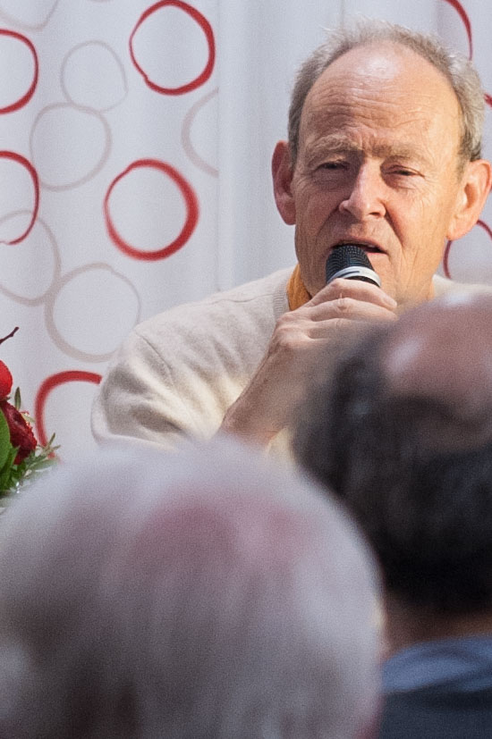 Joseph von Westphalen liest bei der Arbeiterwohlfahrt am Reinmarplatz